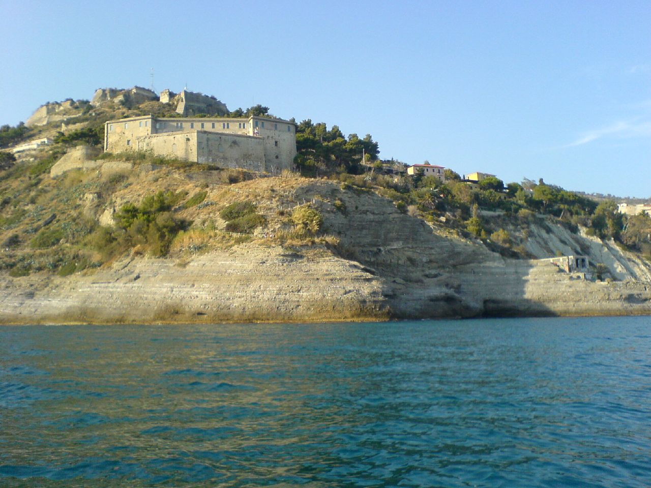 La Fortezza dell'Annunciata vista dal mare sul littorale di Ventimiglia, Italia.